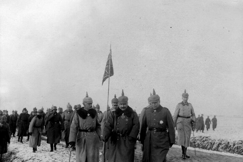 Der Kaiser bei den siegreichen Cambrai-Kämpfern. Der Kaiser, rechts Exz. v. d. Marwitz und links vom Kaiser Kronprinz Rupprecht von Bayern auf dem Wege zur Truppenbesichtigung. Aufgenommen durch: Filmtrupp No. 7 Ort: Bei Cambrai Zeit: Dezember 1917